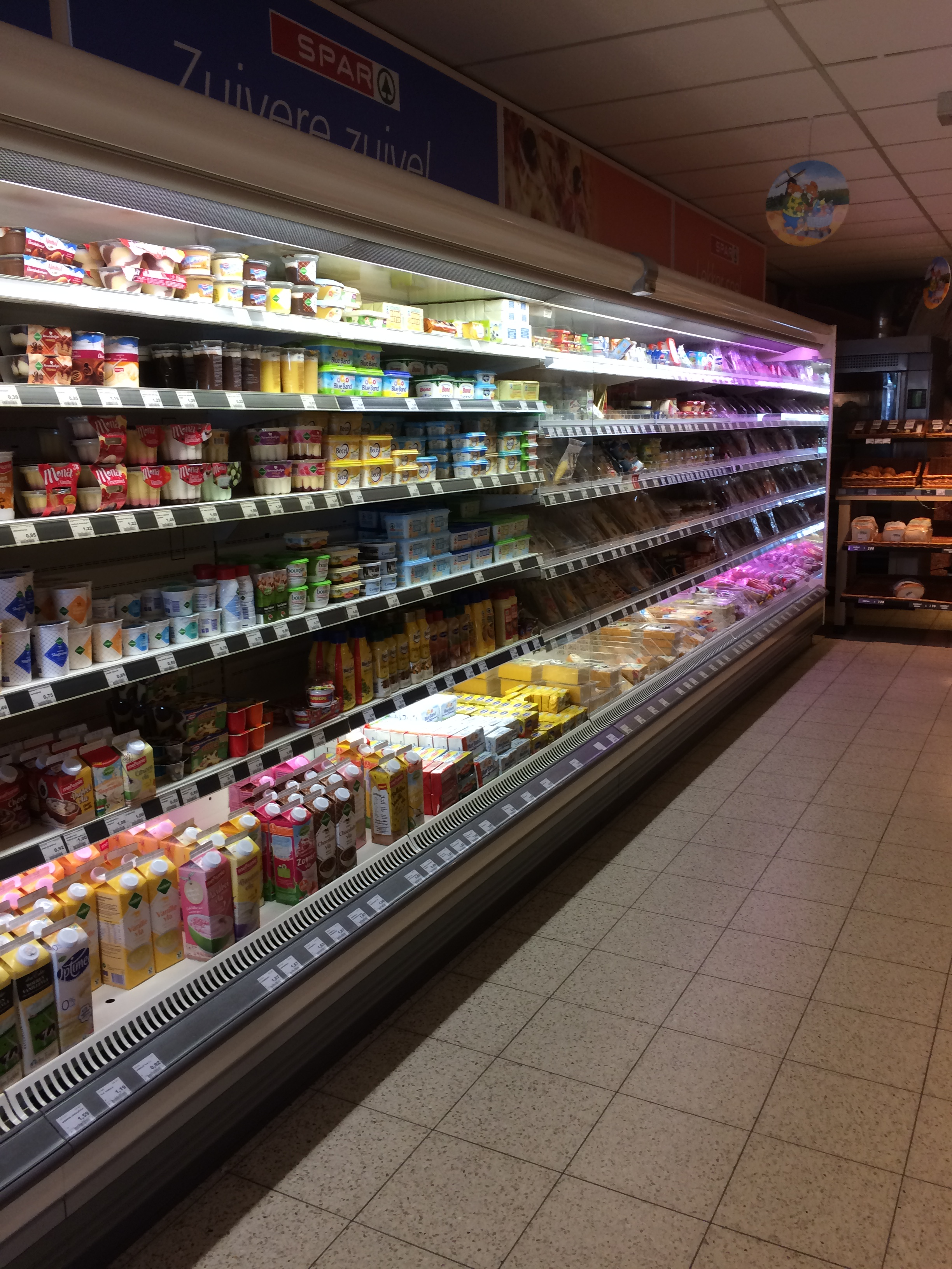 Kühlregal